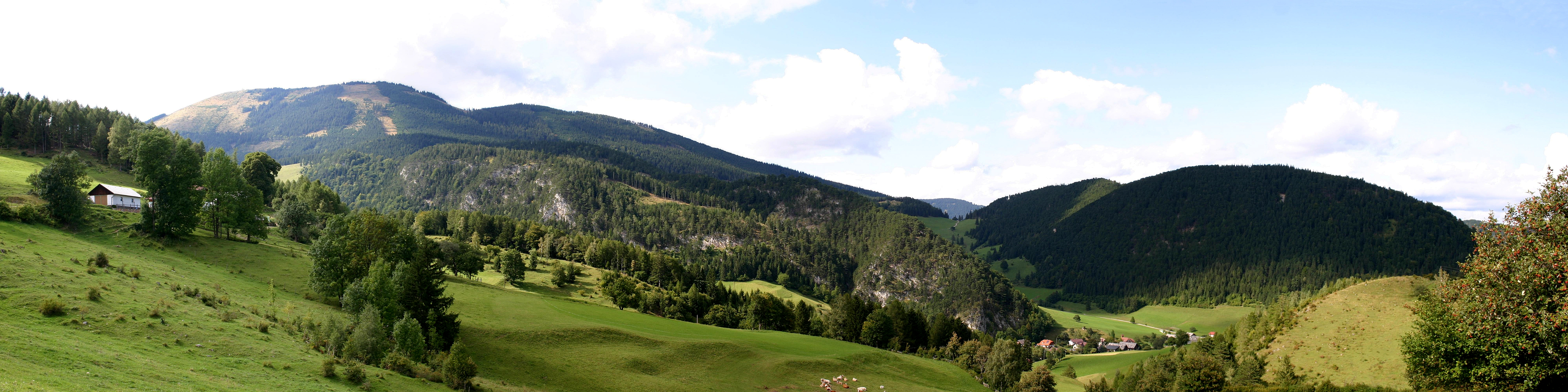 Puchberg am Schneeberg Panorama Katastralgemeinde Rohrbach im Graben (zusammengesetzt mit „autostitch“ aus vier Einzelbildern)